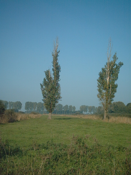 Naturschutzgebiet „Kranenburger Bruch“, Kreis Kleve